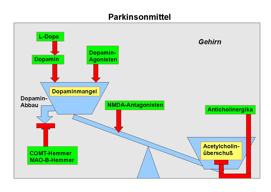 Parkinsonmittel